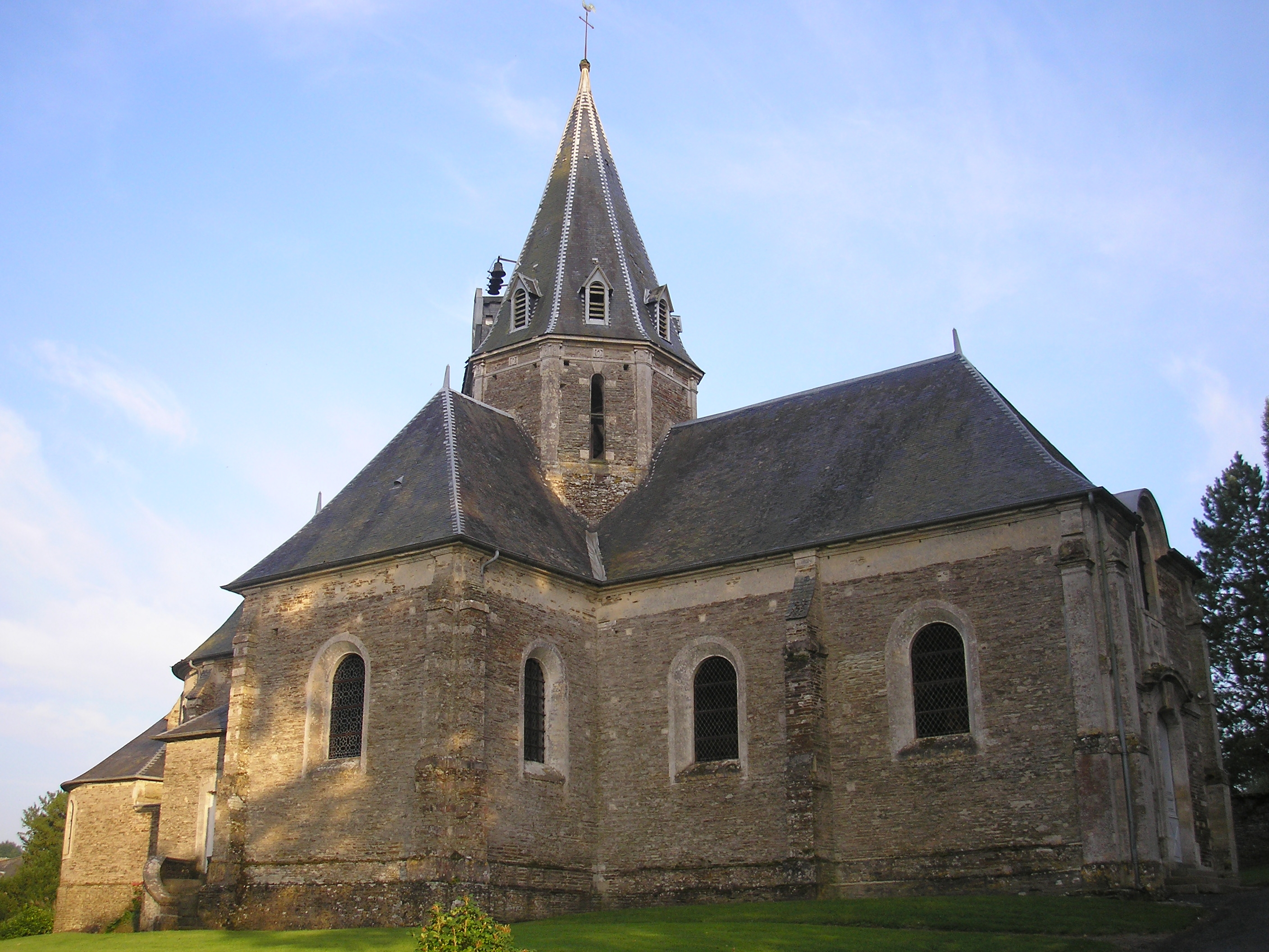 Balleroy (Normandie, France). L'église Saint-Martin (CLMH, 21/04/1951). année 1650